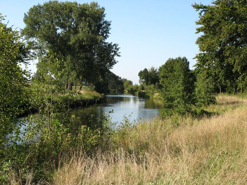 Unterlauf der Rur bei Ratheim (Herbst 2006)